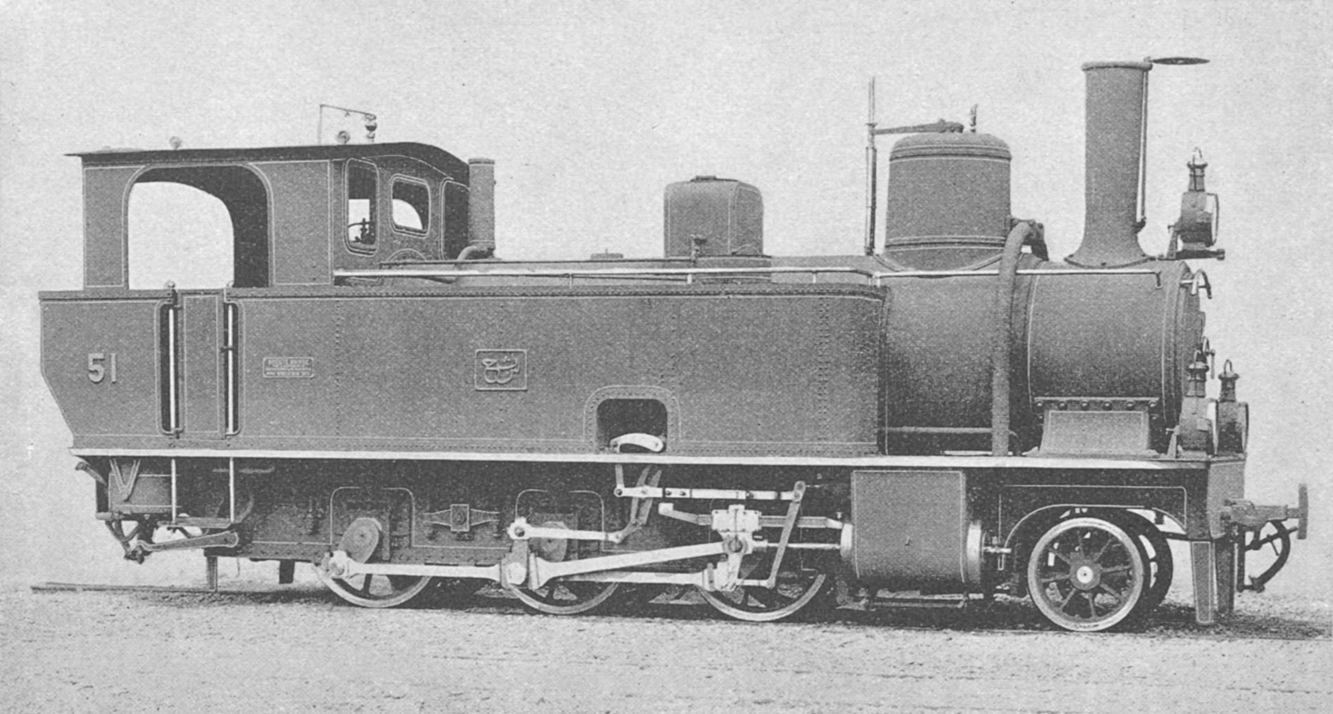 Beirut-Damaskus-Bahn: Tenderlokomotive mit drei gekuppelten Adhäsionsachsen und vorderen Bisselachse für Adhäsionsantrieb, geliefert von der Schweizerischen Lokomotiv- und Maschinenfabrik Winterthur